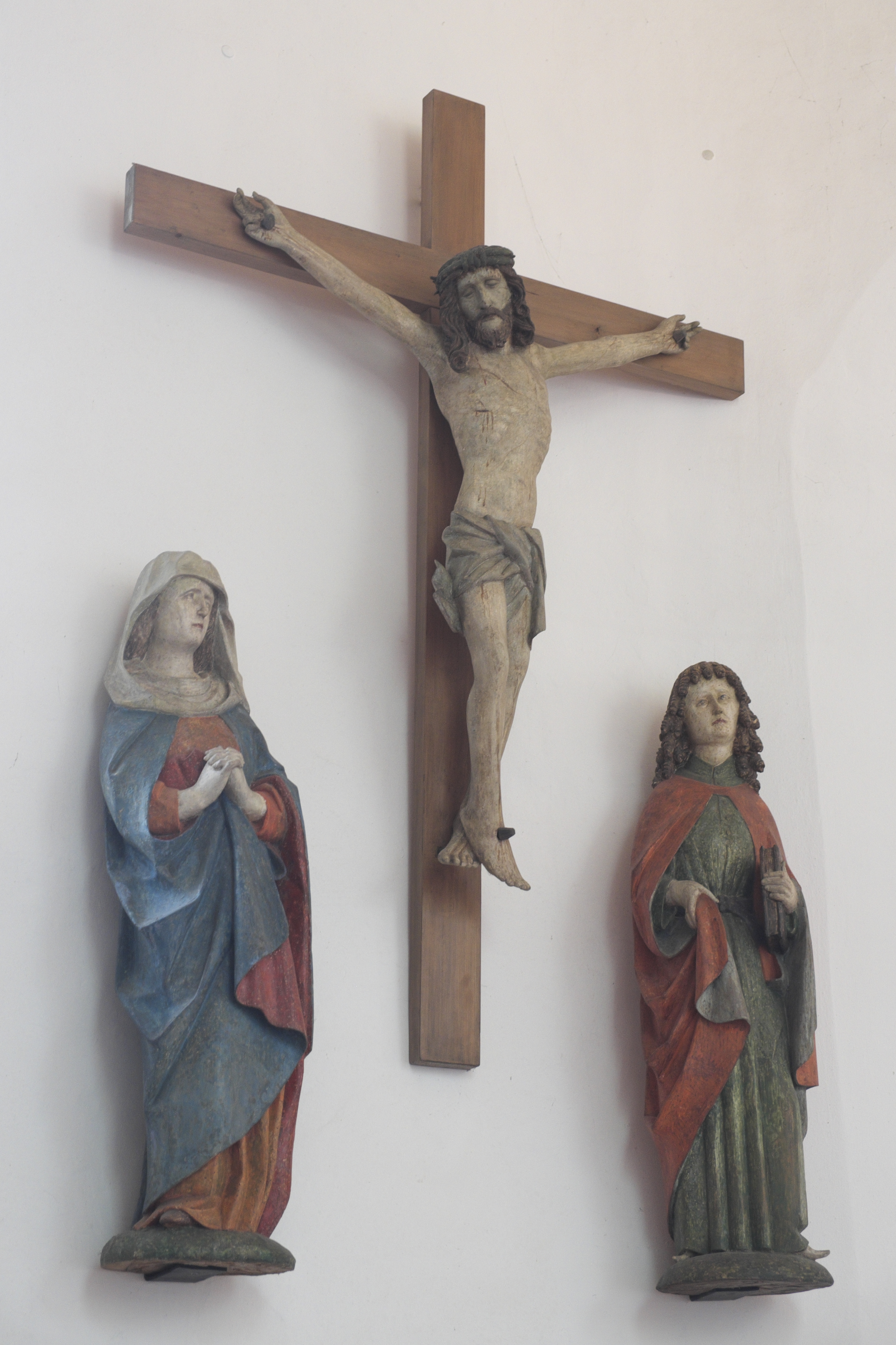 Alte katholische Pfarrkirche St. Georg in Obermenzing im Stadtbezirk Pasing-Obermenzing in München (Bayern/Deutschland), spätgotische Kreuzigungsgruppe